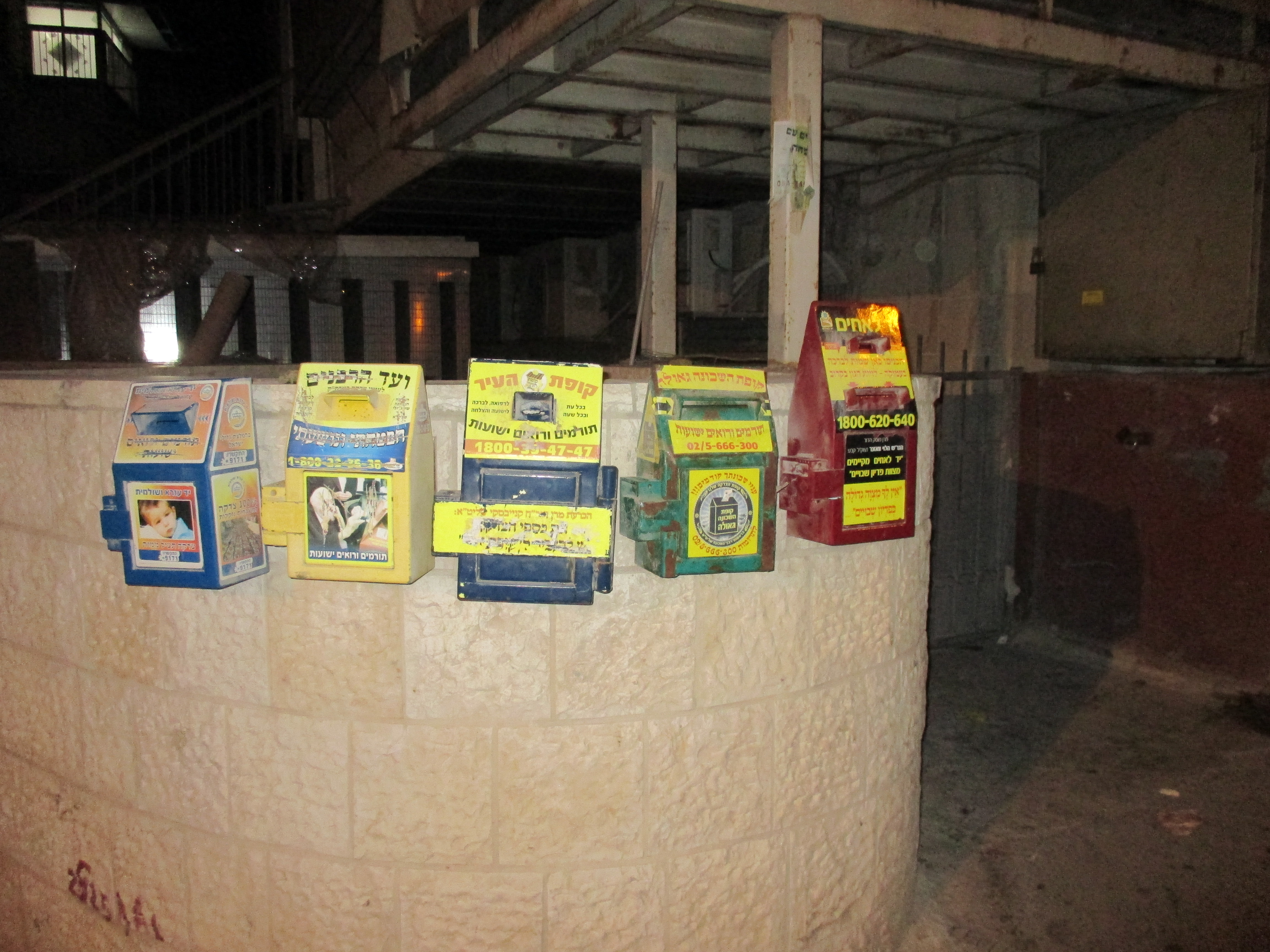 מגוון קופות צדקה בירושלים.